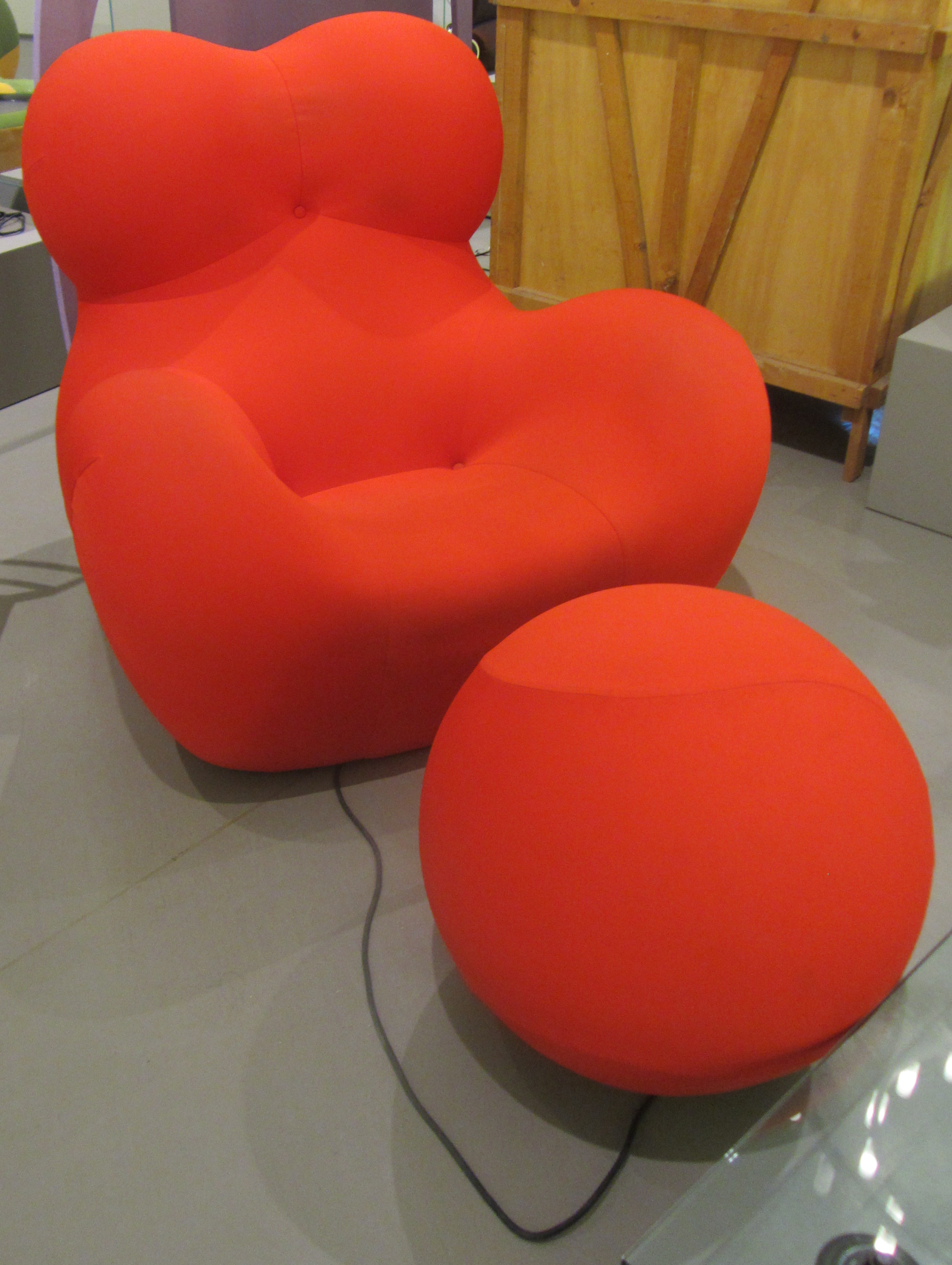 Le poltrone UP5 e UP6 al Triennale Design Museum di Milano durante la mostra "le fabbriche dei sogni" Serie UP di Gaetano Pesce B&B ITALIA 1969 + riedizione 2000